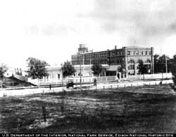 Thomas Alva Edisons West Orange Laboratory, Lithographie aus den 1890er Jahren